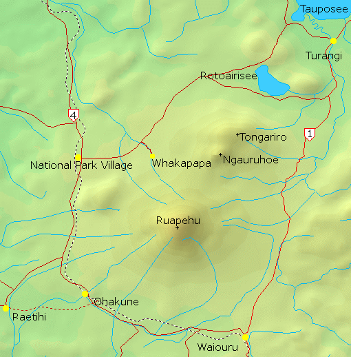 Karte des Tongariro Nationalparks in Neuseeland